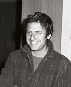 אורי זוהר, מתוך הסרט קוראים לי שמיל